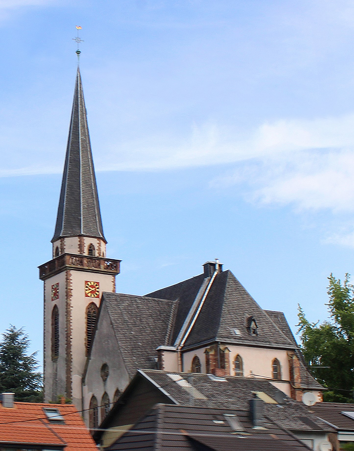 Die evangelische Kreuzkirche in Saarbrücken-Herrensohr.